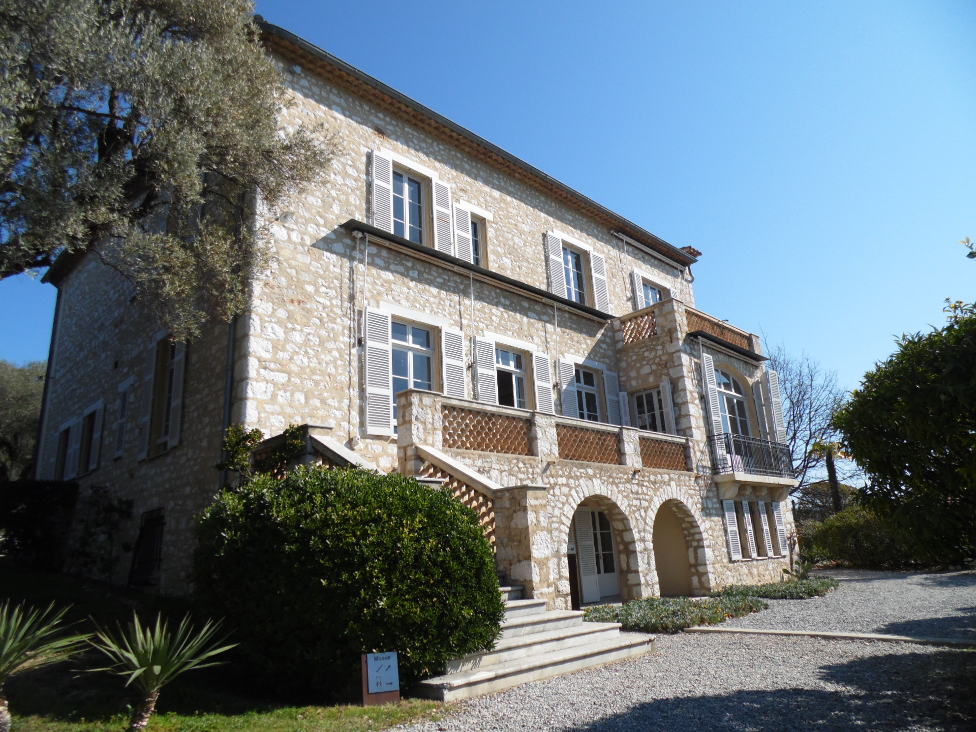 Musée Renoir de Cagnes-sur-Mer